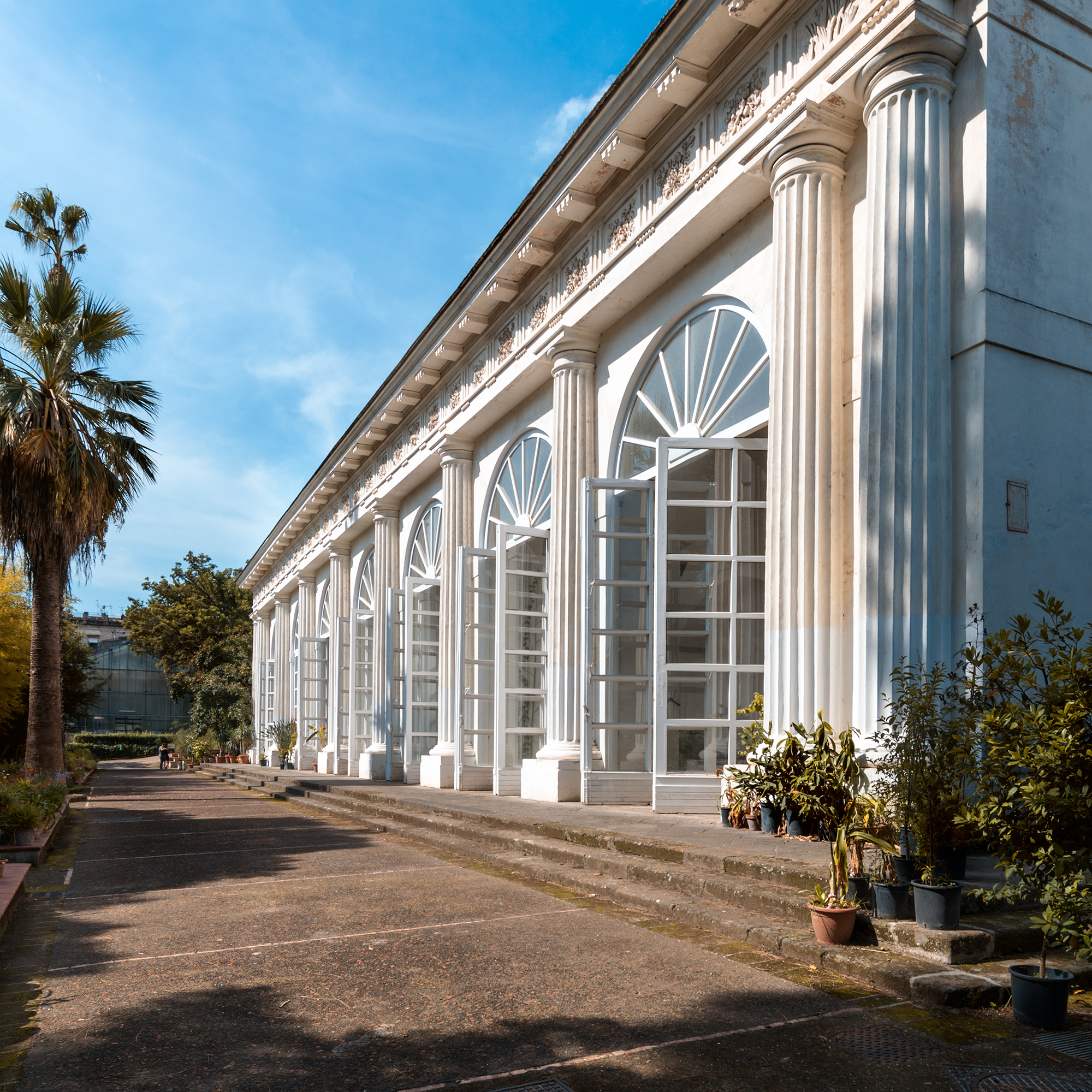 Serra Merola, Real Orto Botanico di Napoli Architetto:Giuliano de Fazio 1809/1820.